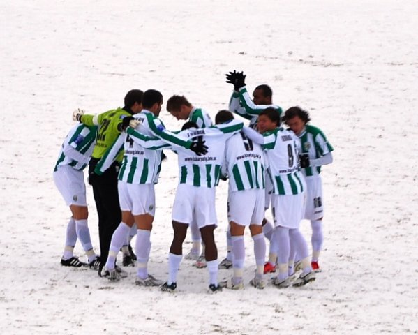 Футболисты ФК Карпаты (Львов)